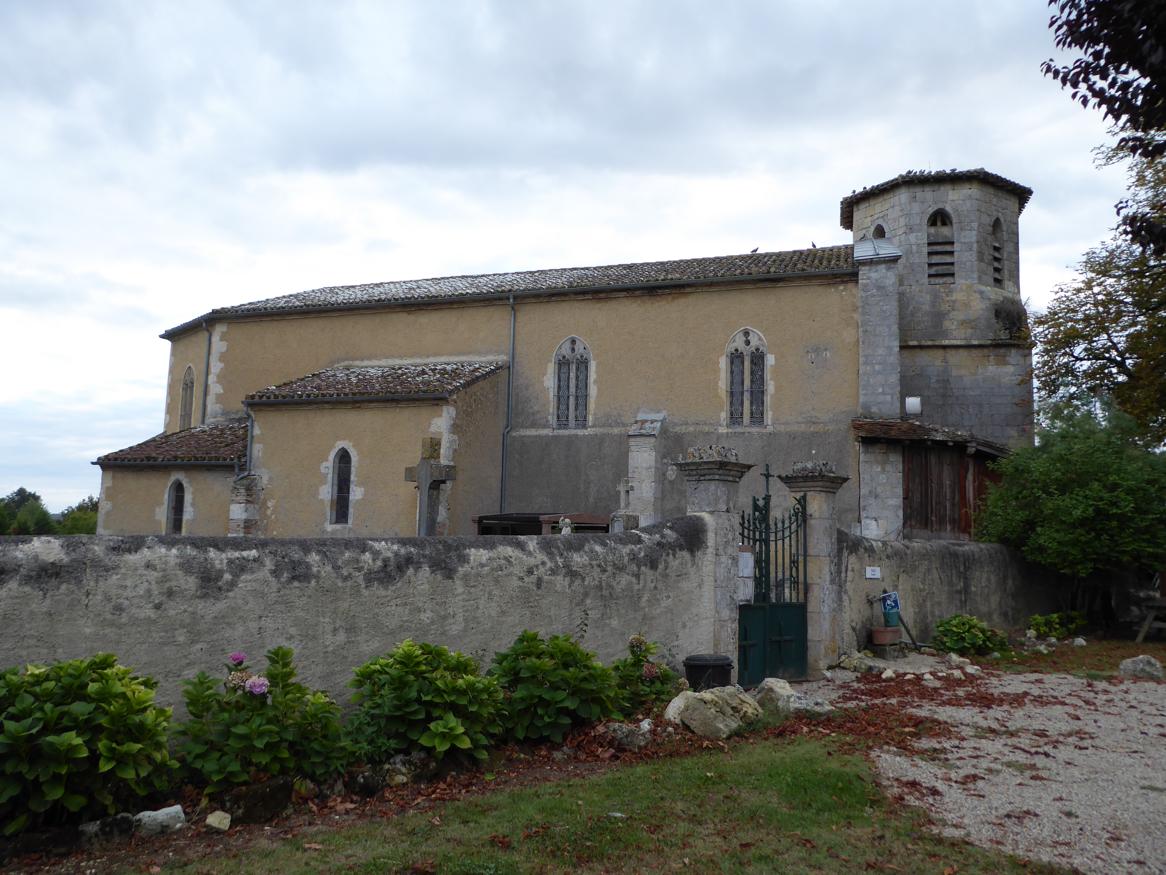 Église Sainte-Blandine de Castet-Arrouy